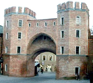 Landtor in Landshut (2003)